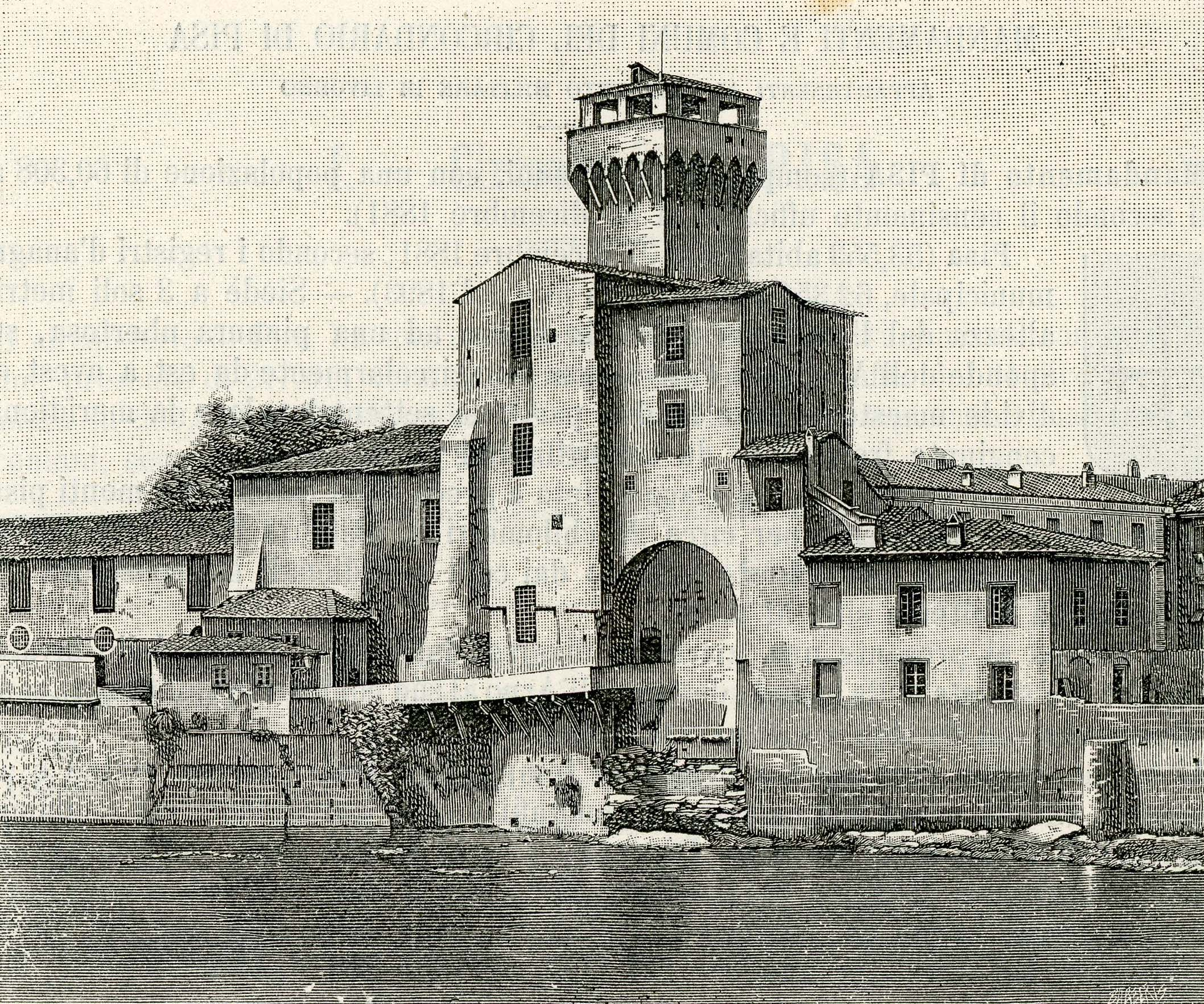 Pisa: La Cittadella, coi resti dell’antico Arsenale della Repubblica pisana (xilografia di Giuseppe Barberis).